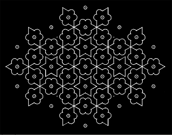 Drawn by mayooranathan